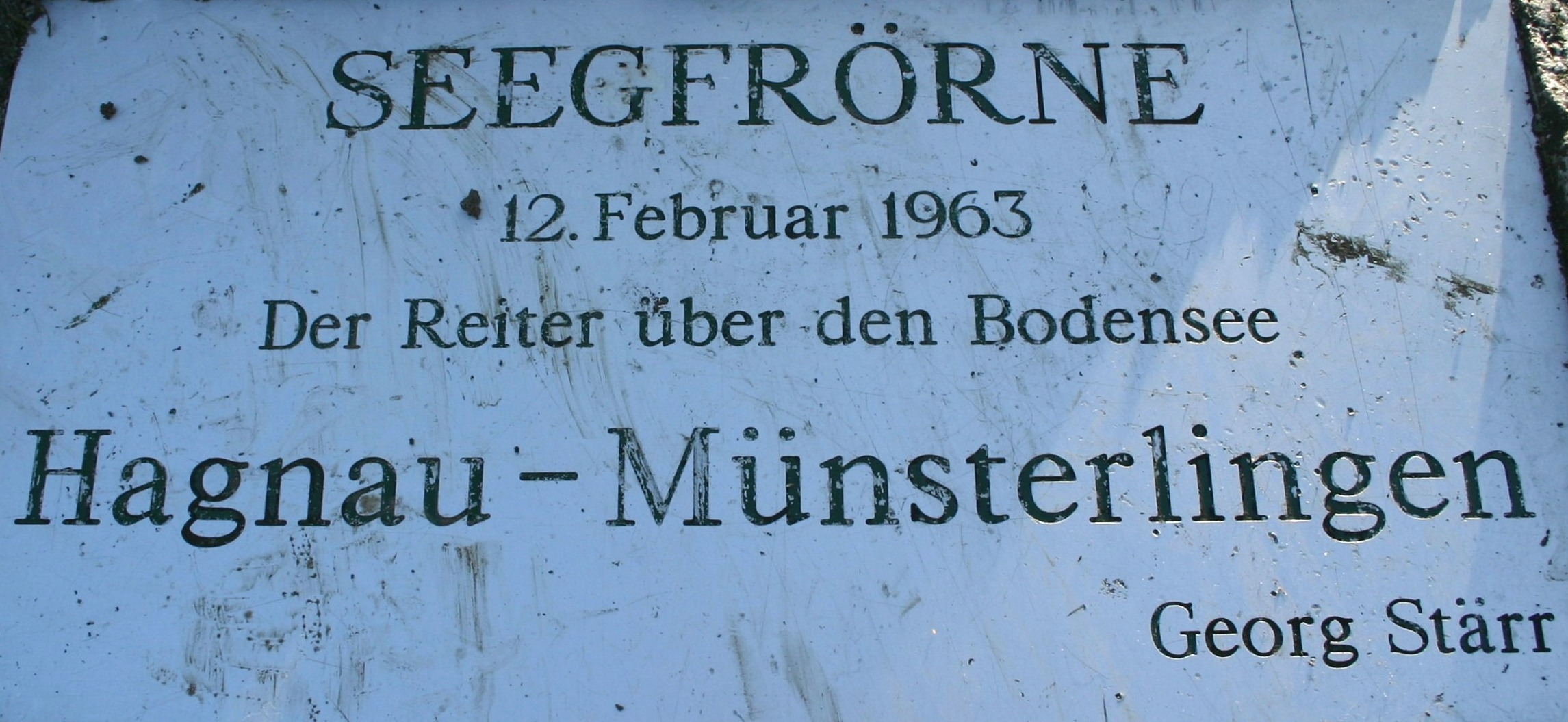 Plack vum Georg Stärr.